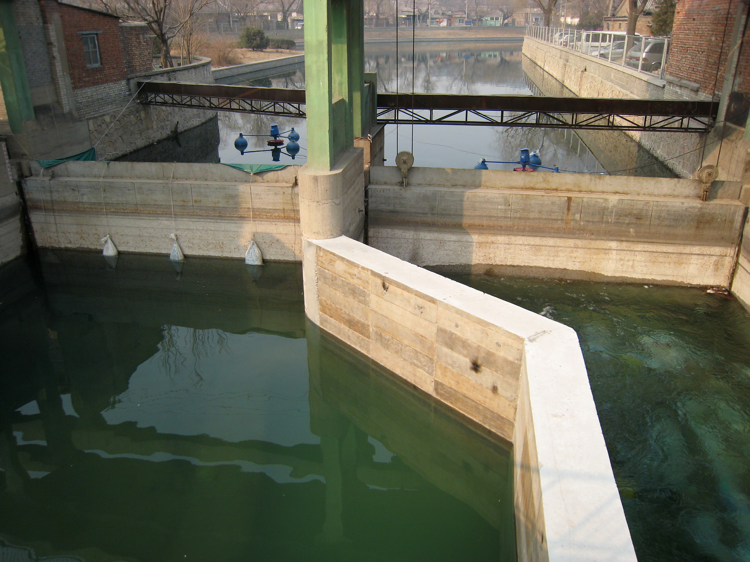 京密引水渠水闸